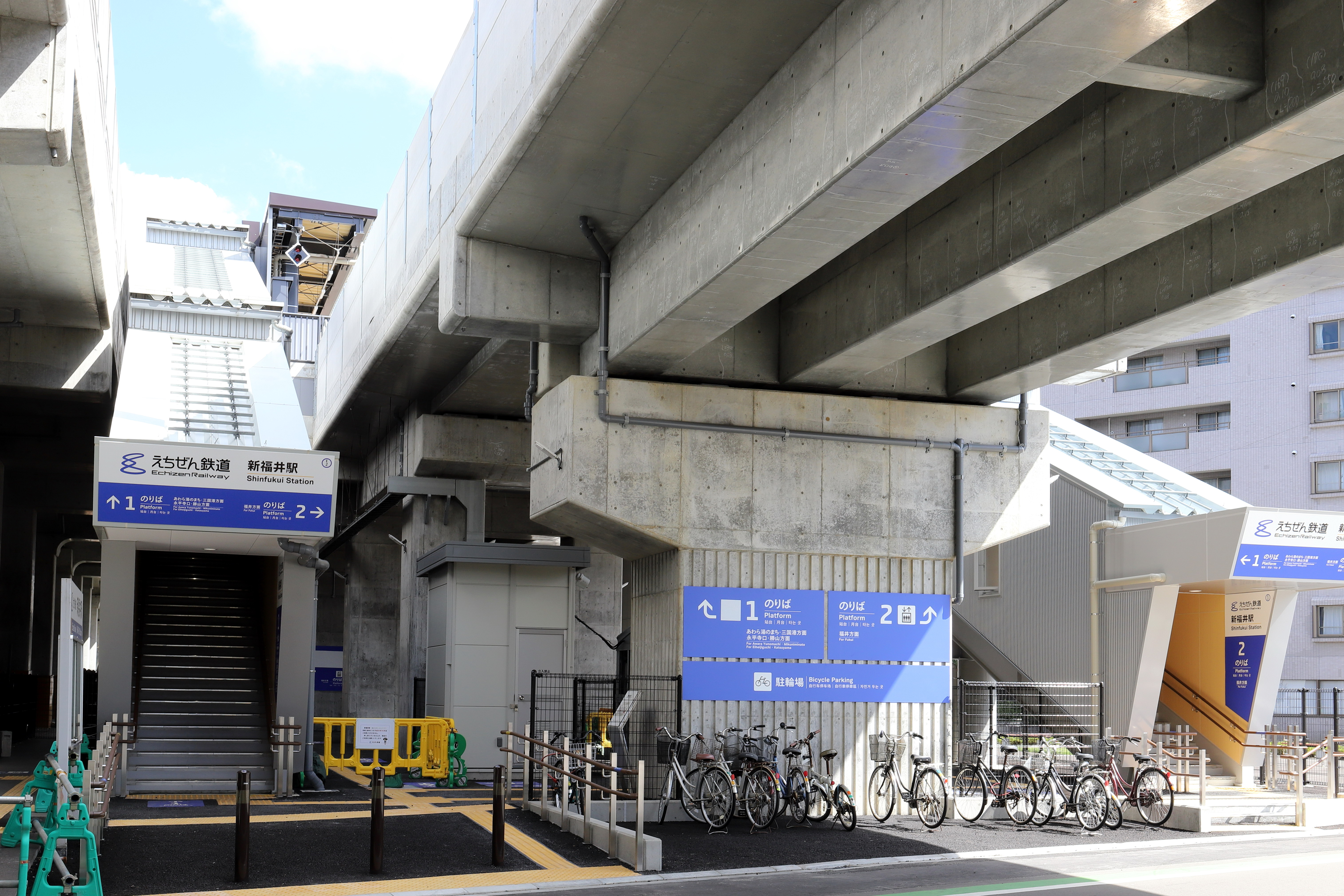 えちぜん鉄道高架化後の新福井駅